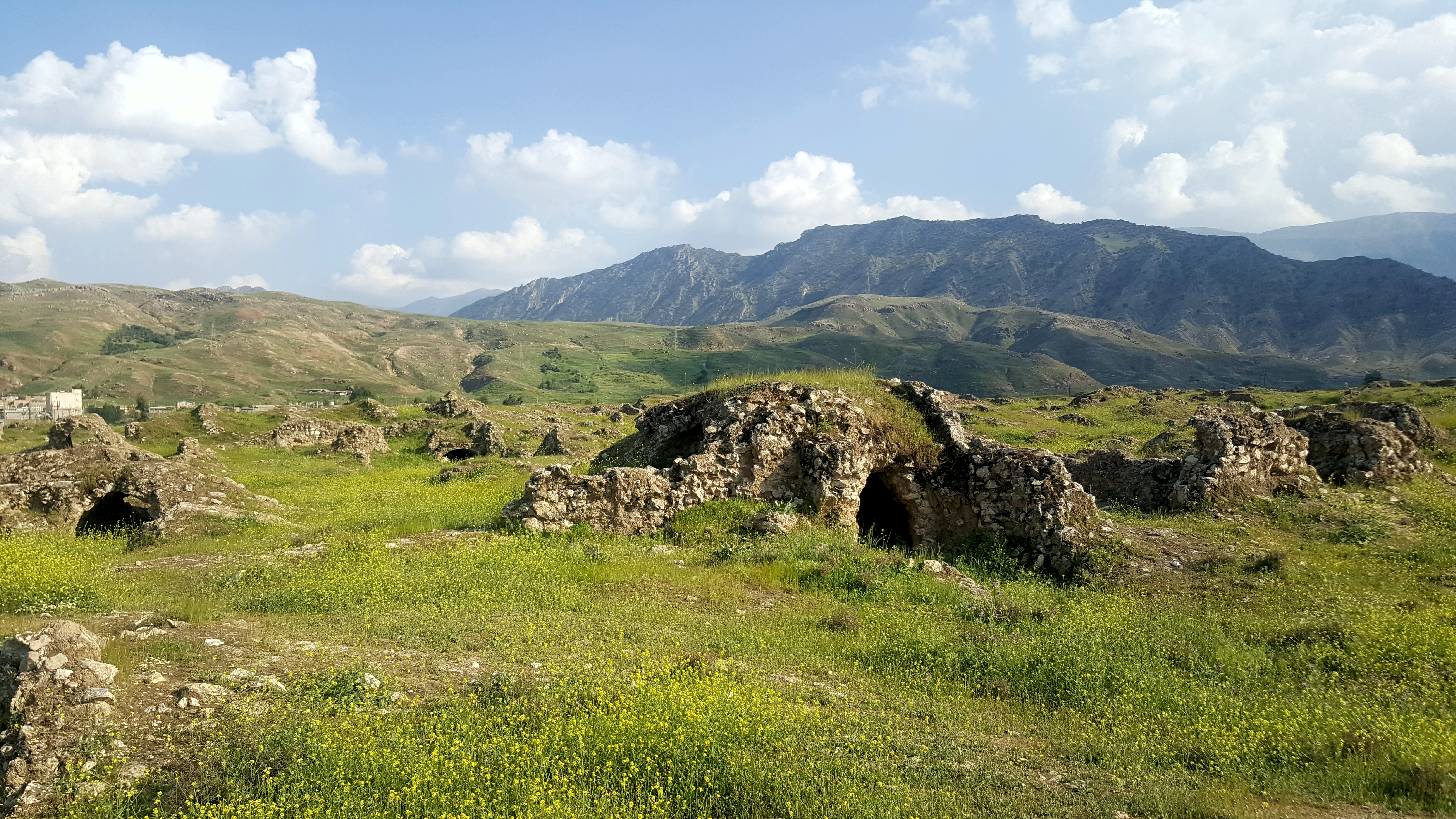 شهر تاریخی دره شهر/ سیمره